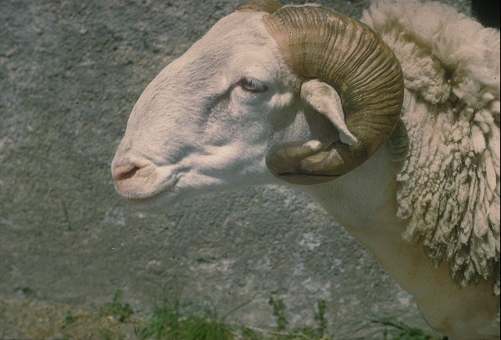 Tête de mouton tarasconnais